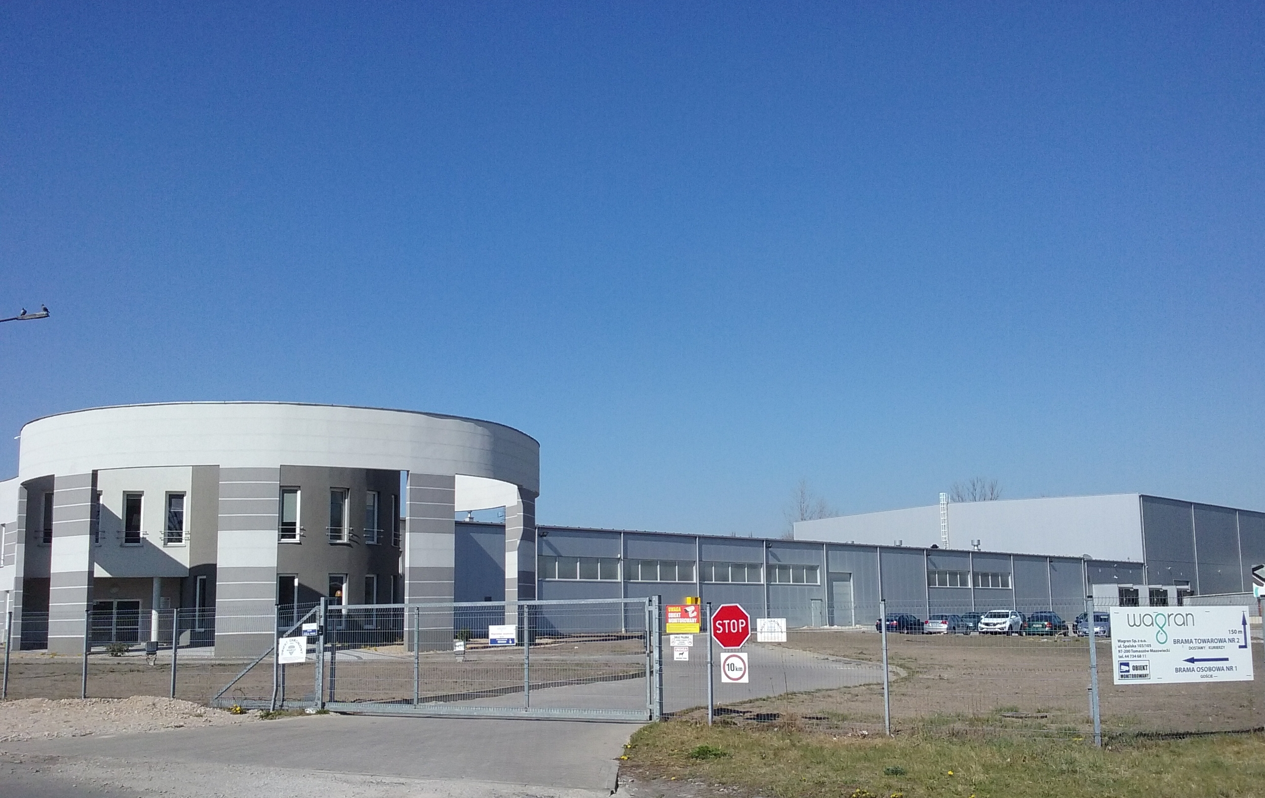 Tomaszów Mazowiecki w województwie łódzkim, PL,EU. Fabryka Wagran produkująca granitowe zlewy, na terenie dawnego Wistomu. CC0